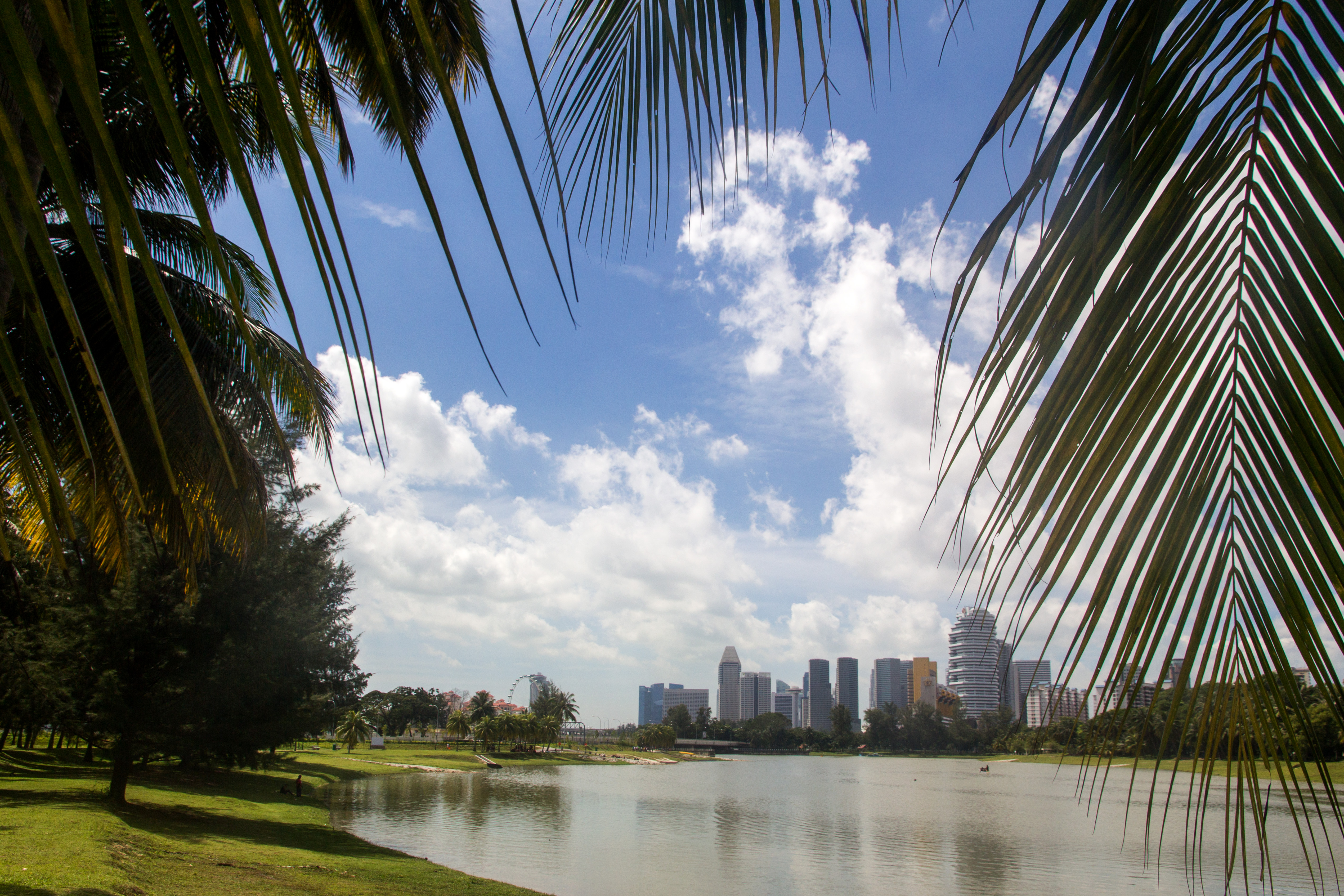 Kallang River